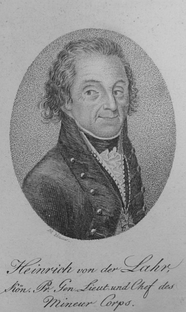 Heinrich von der Lahr (1734–1816), Lieutenant General in the Prussian Mining Corps